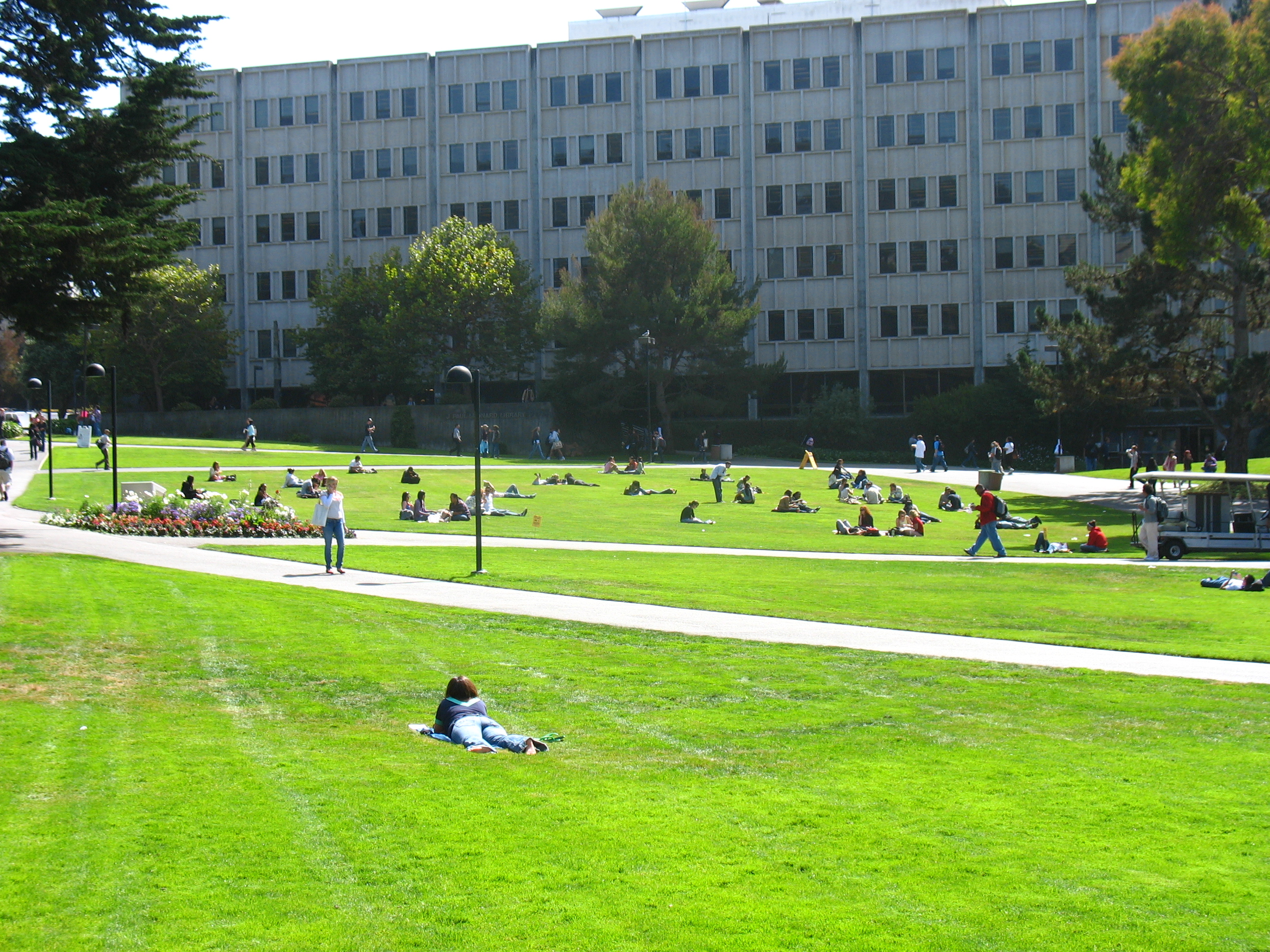 Looka em all. S'many.